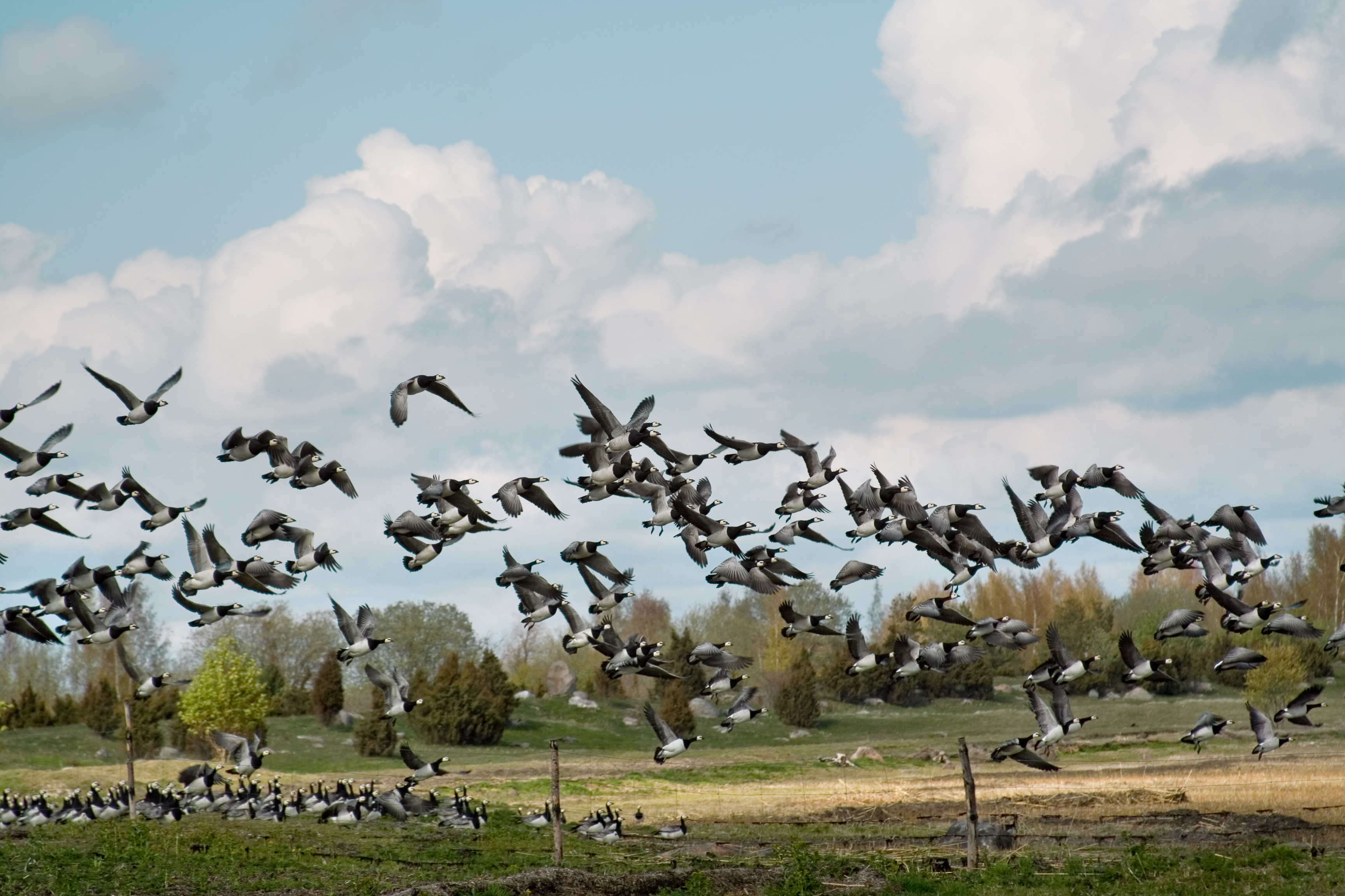 Puise poolsaar. Valgepõsk-lagled